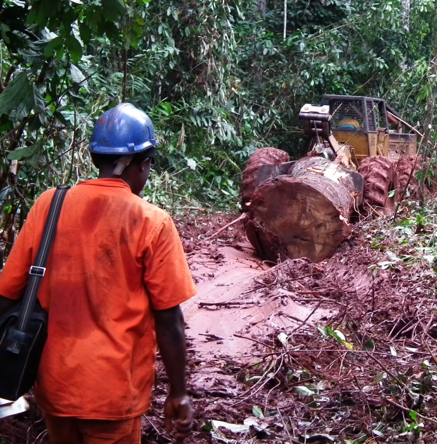 Employé protégé par ses équipements de protection individuel (EPI) dans une exploitation forestière à l'Est du Cameroun.